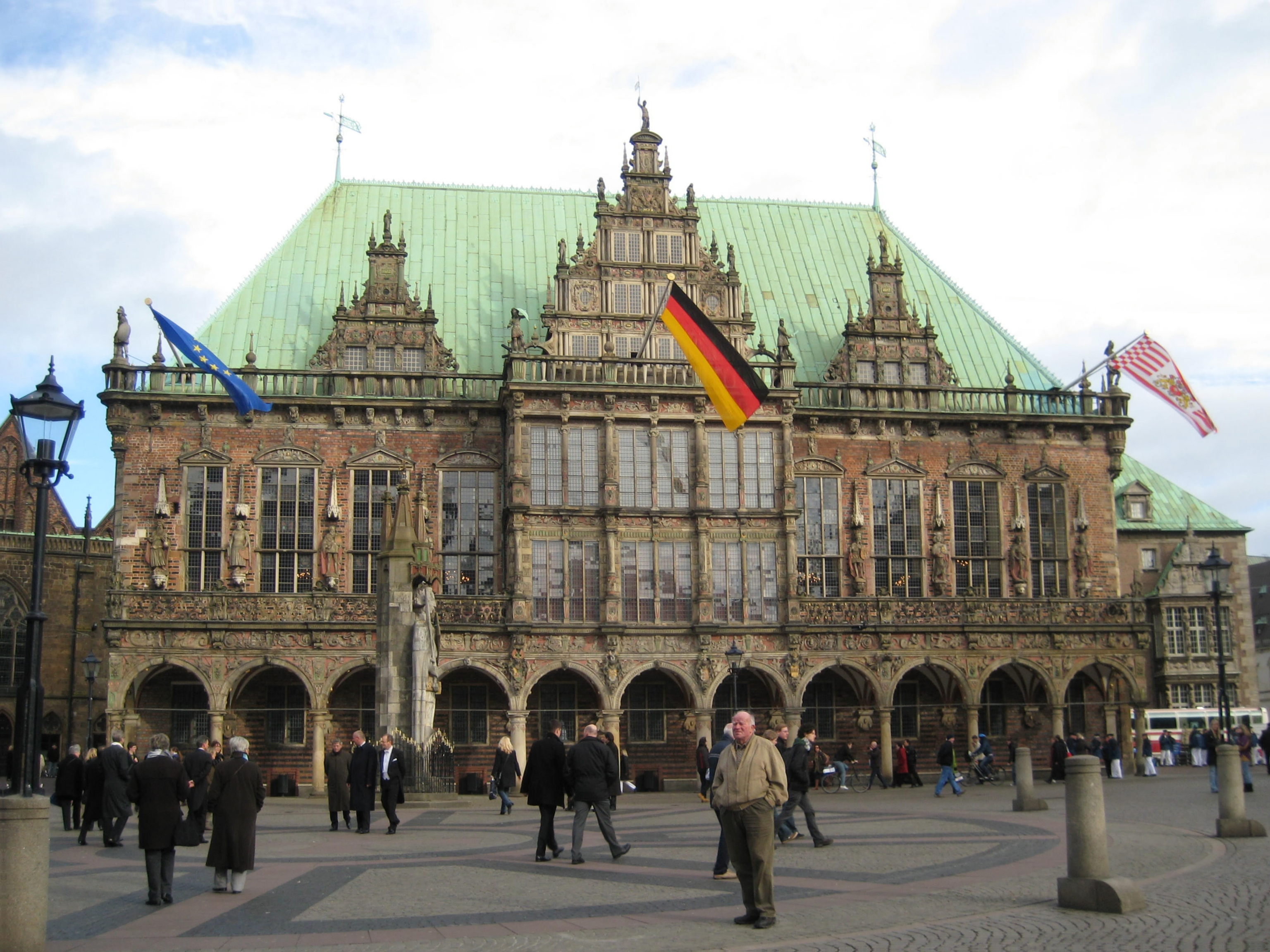 Bremer Rathaus mit offizieller Beflaggung (von links): Europaflagge, deutsche Bundesflagge und Bremische Staatsflagge; hier am Tage der 467. Schaffermahlzeit 2011.